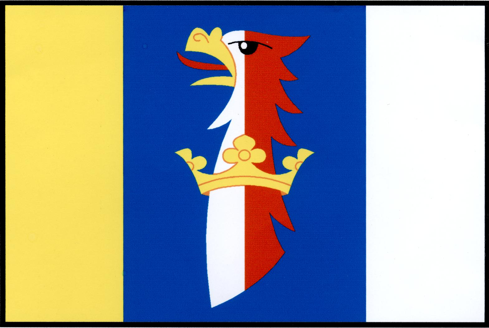 Vlajka obce Číhaň